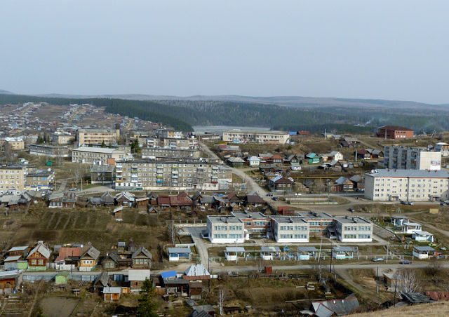 Россия, Челябинская область, город Нязепетровск